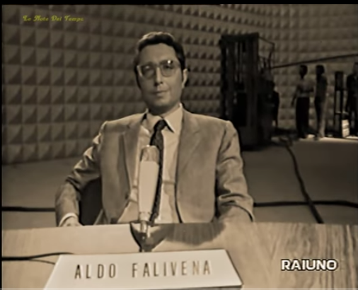 ALDO FALIVENA nel 1968